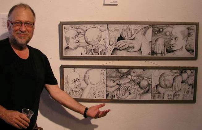 יהודה בן נחום צייר ישראל